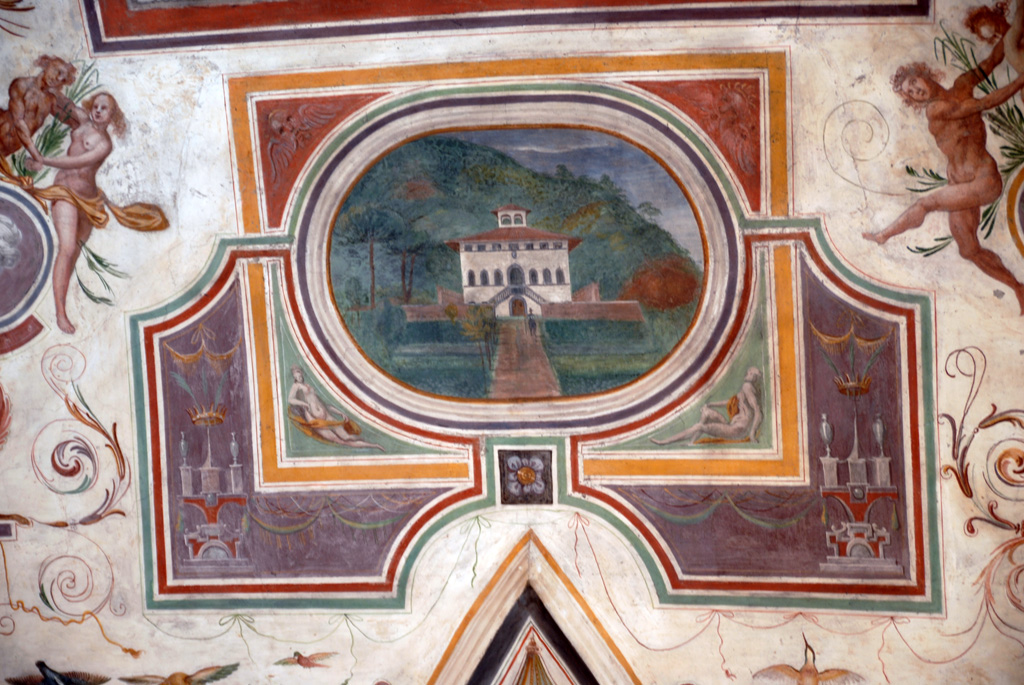 Palazzo di Corliano, affresco di Andrea Boscoli del 1592